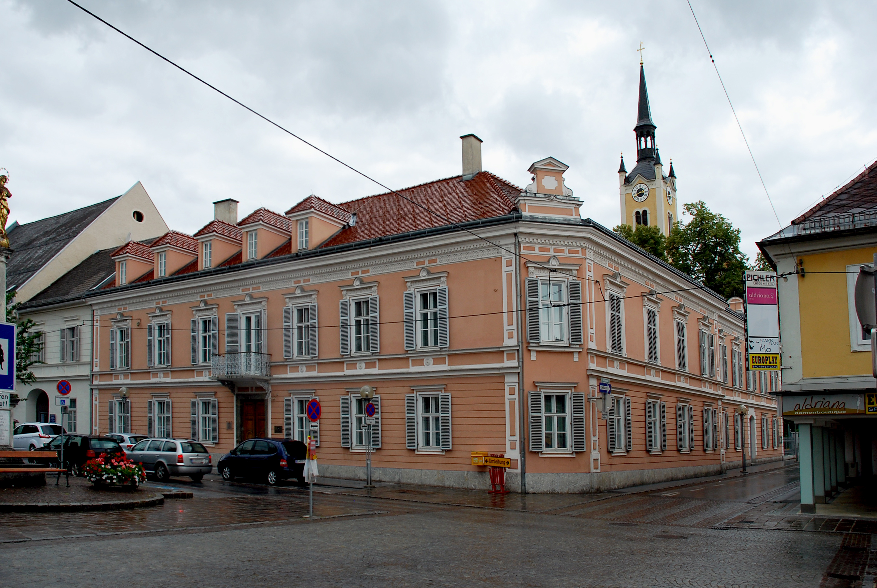 Deutschlandsberg, Steiermark, Österreich: Hauptplatz Bezirksgericht Ecke Kirchengasse